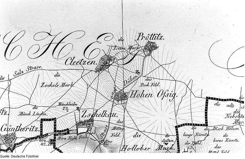 Original image description from the Deutsche Fotothek Krostitz-Kletzen. Oberreit, Sect. Leipzig, 1836/39